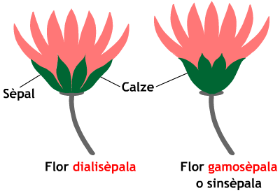 Tipus de calze (flors dialisèpales i gamosèpales)